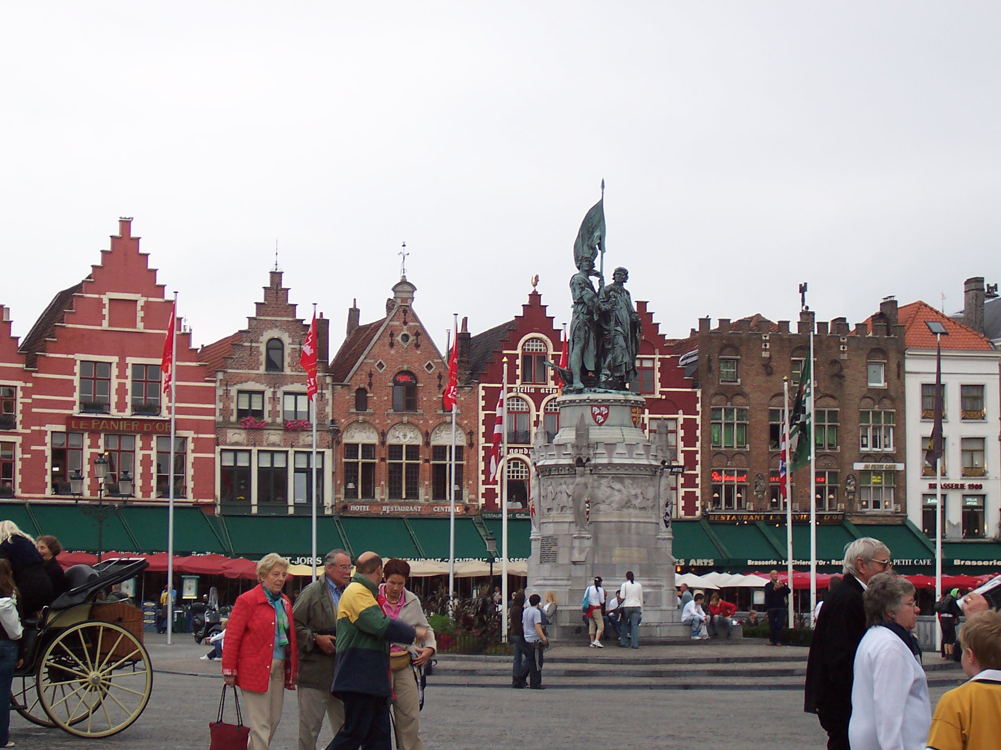 Grote Markt, Denkmal für Jan Breydel und Pieter de Coninck